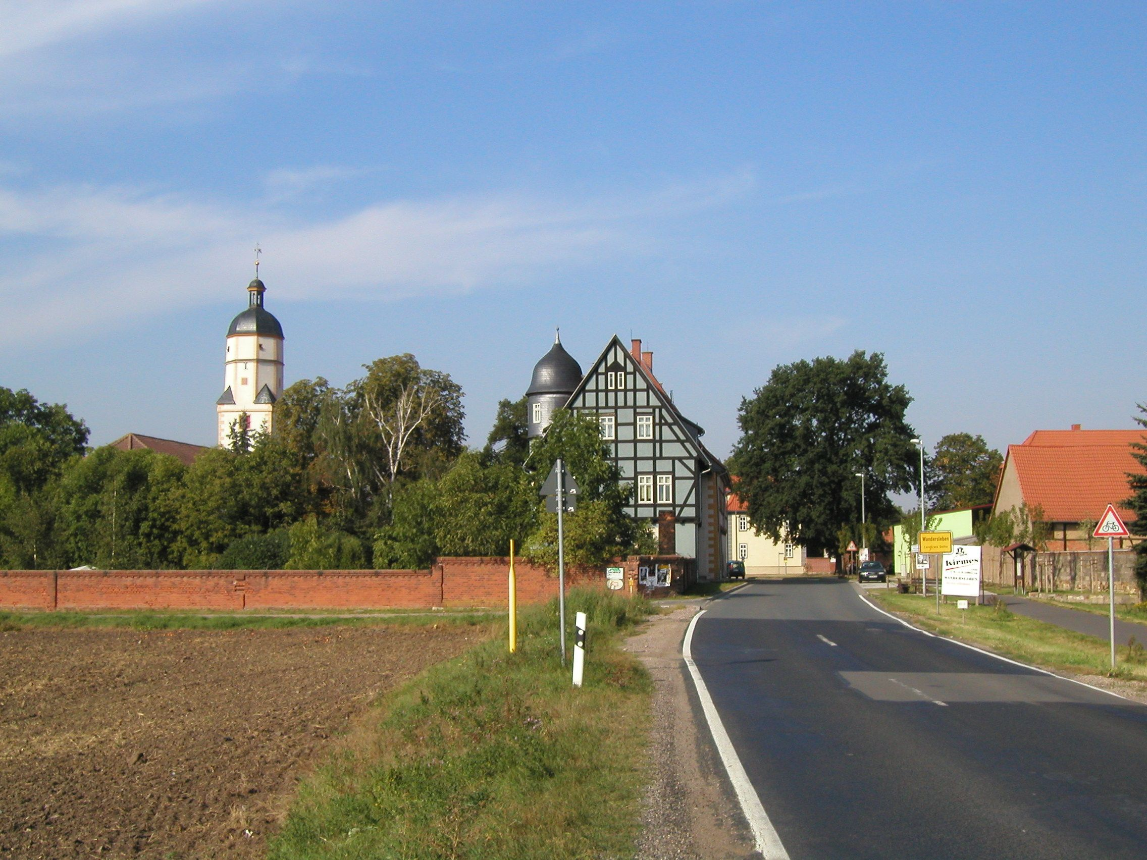 Wandersleben in Thüringen, Deutschland von Osten